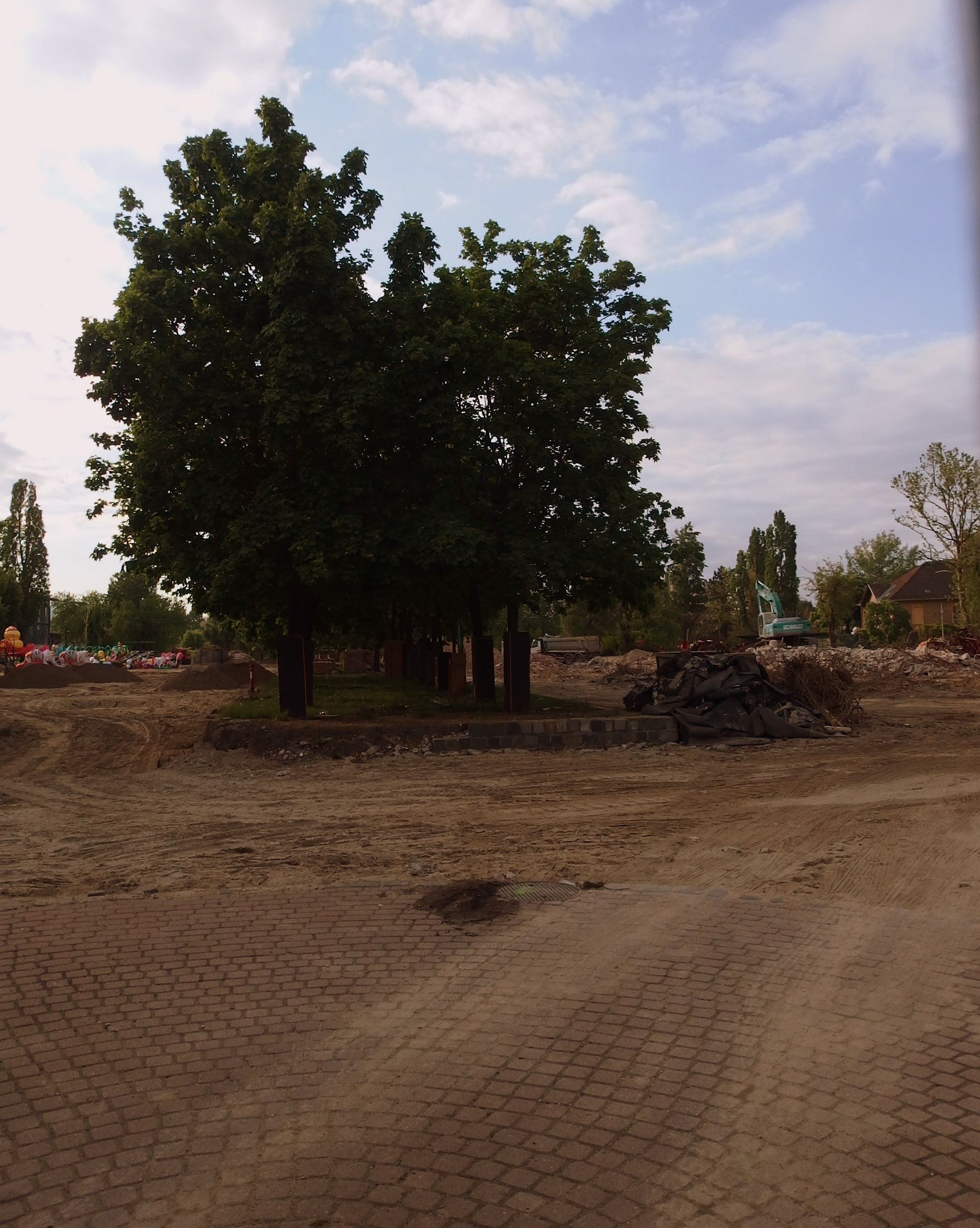 A Budapest Vidám Park bontása, Buadpest XIV. kerület